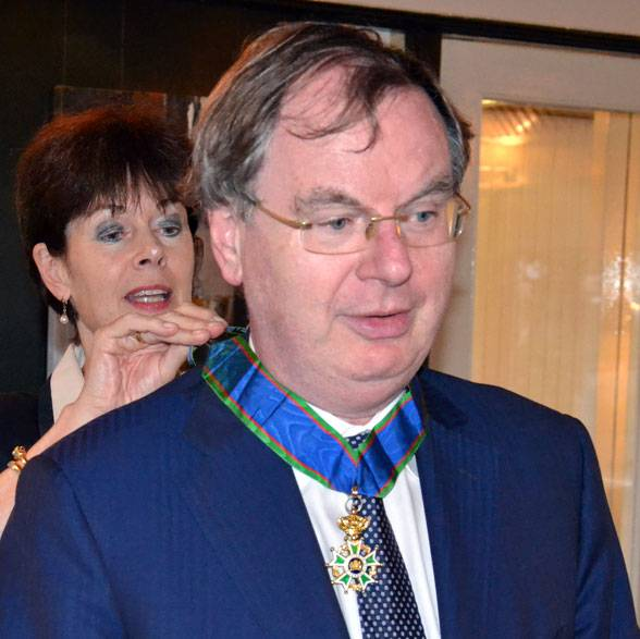 Bernard Wientjes ontvangt het Ereteken van Verdienste van het ministerie van Buitenlandse Zaken.